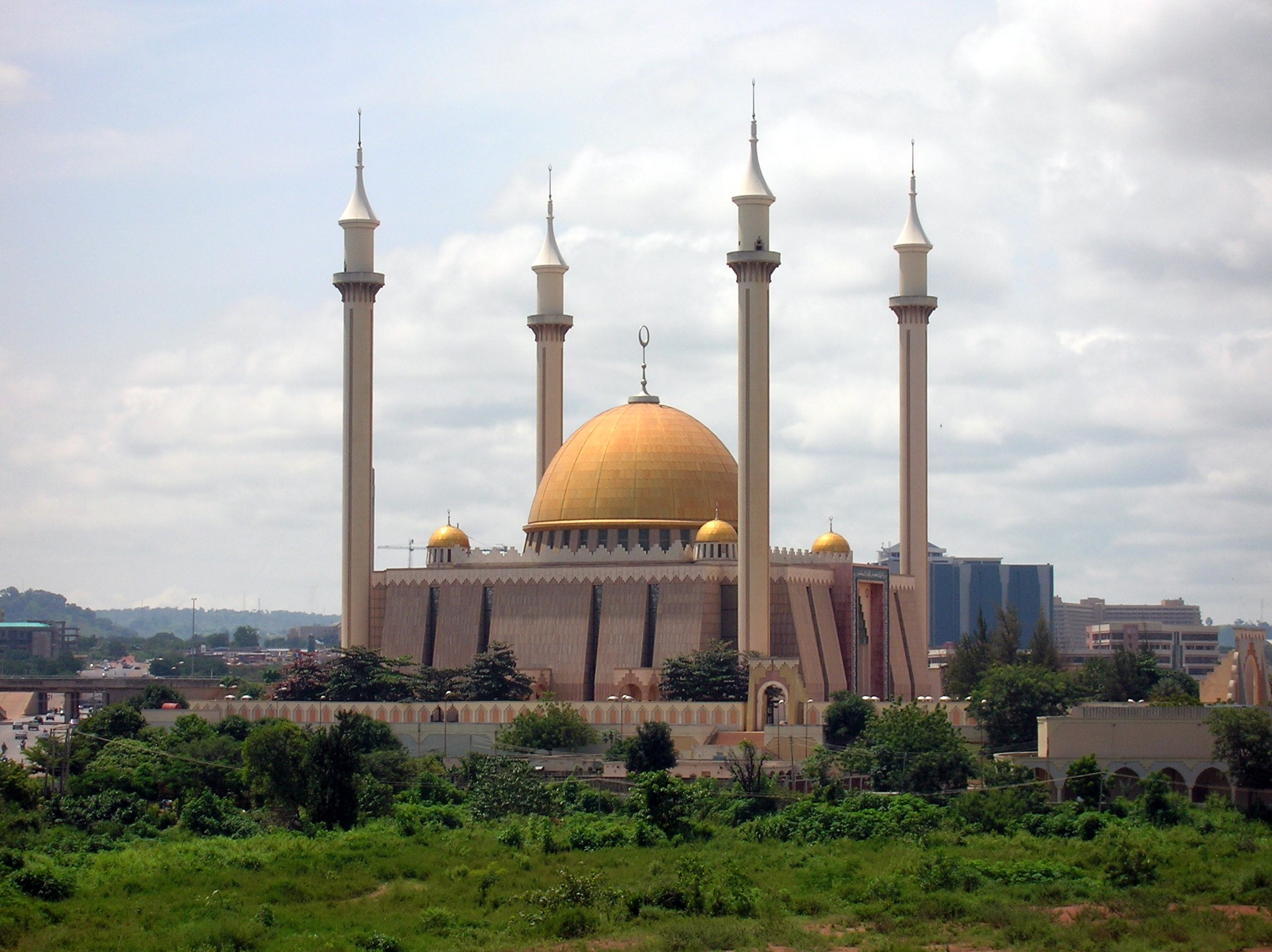 Abuja National Mosque